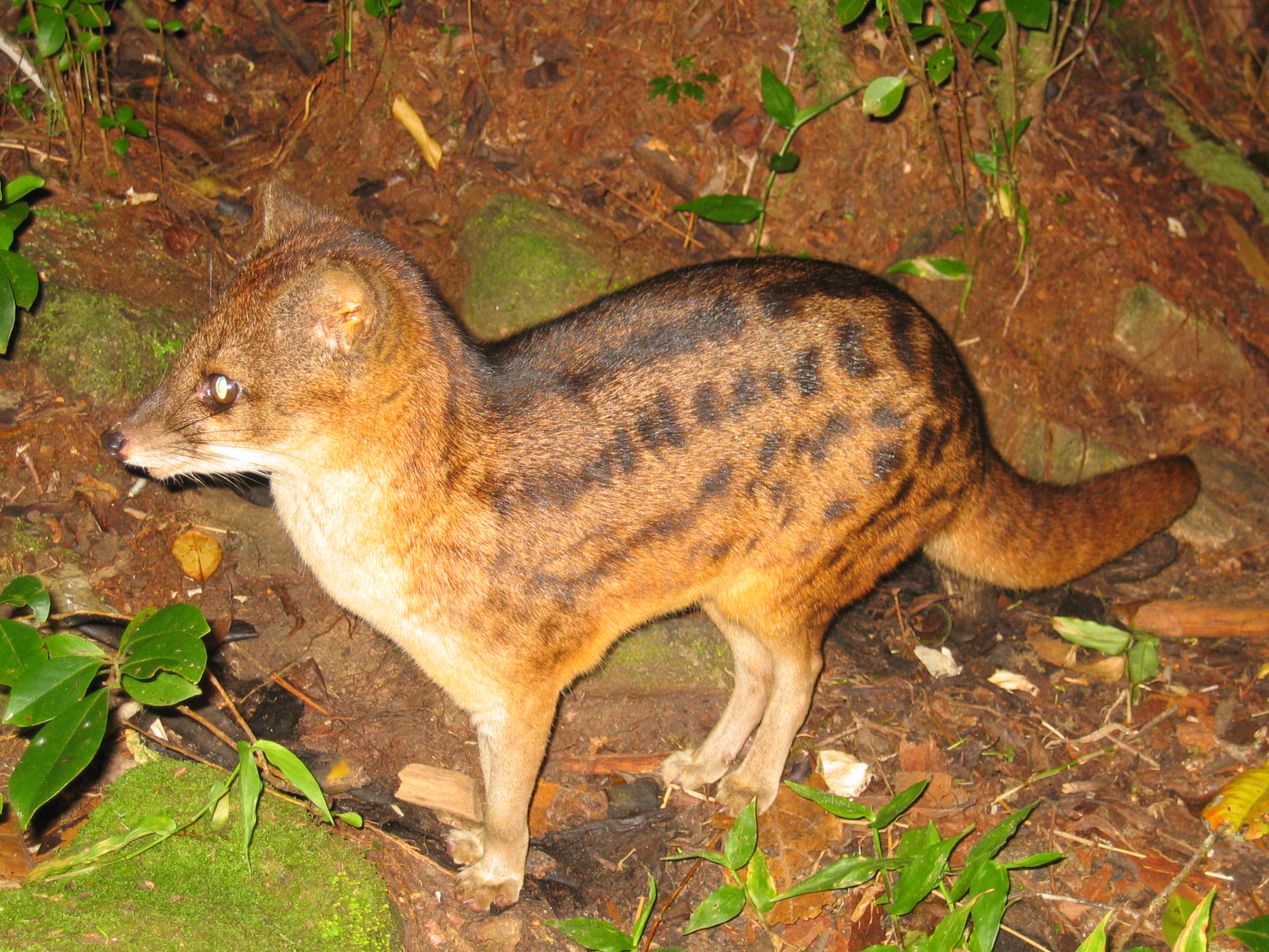 fanaloka o civeta de Madagascar, dando un paseo por Ranomafana NP, que se acercó bastante a nosotros.